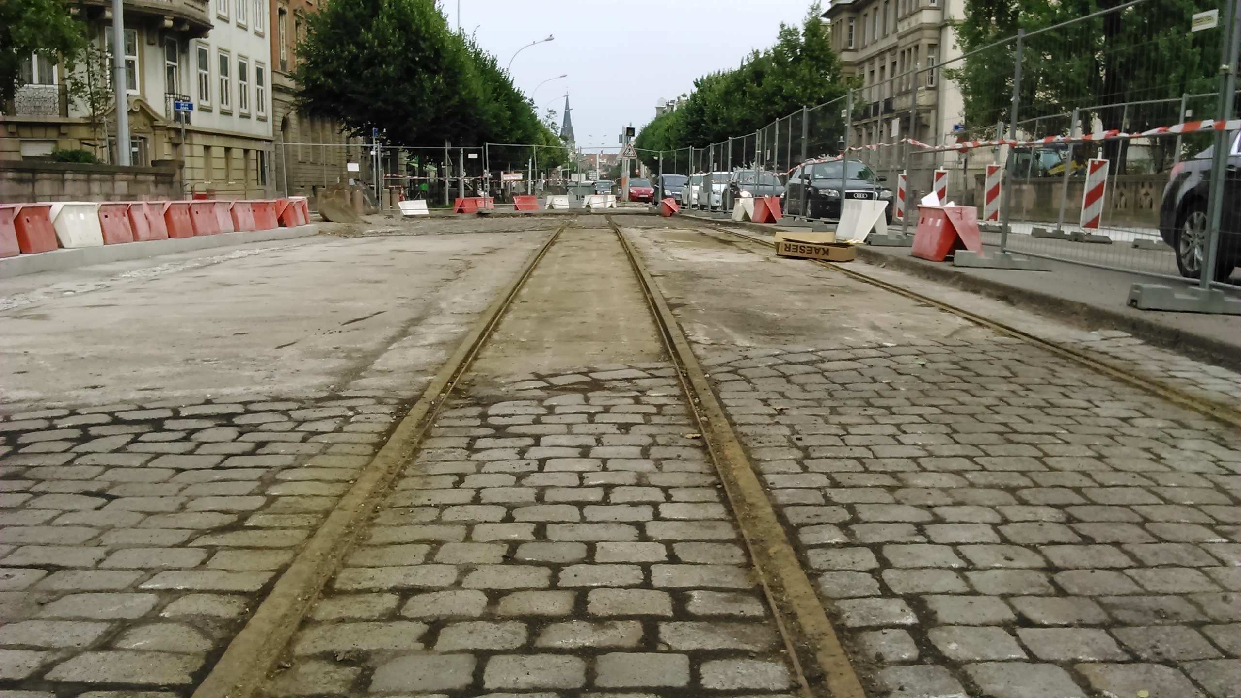 Rails de l'ancien tramway de Strasbourg sur le Pont des Vosges mis à jour au cours d'un chantier en juillet 2014